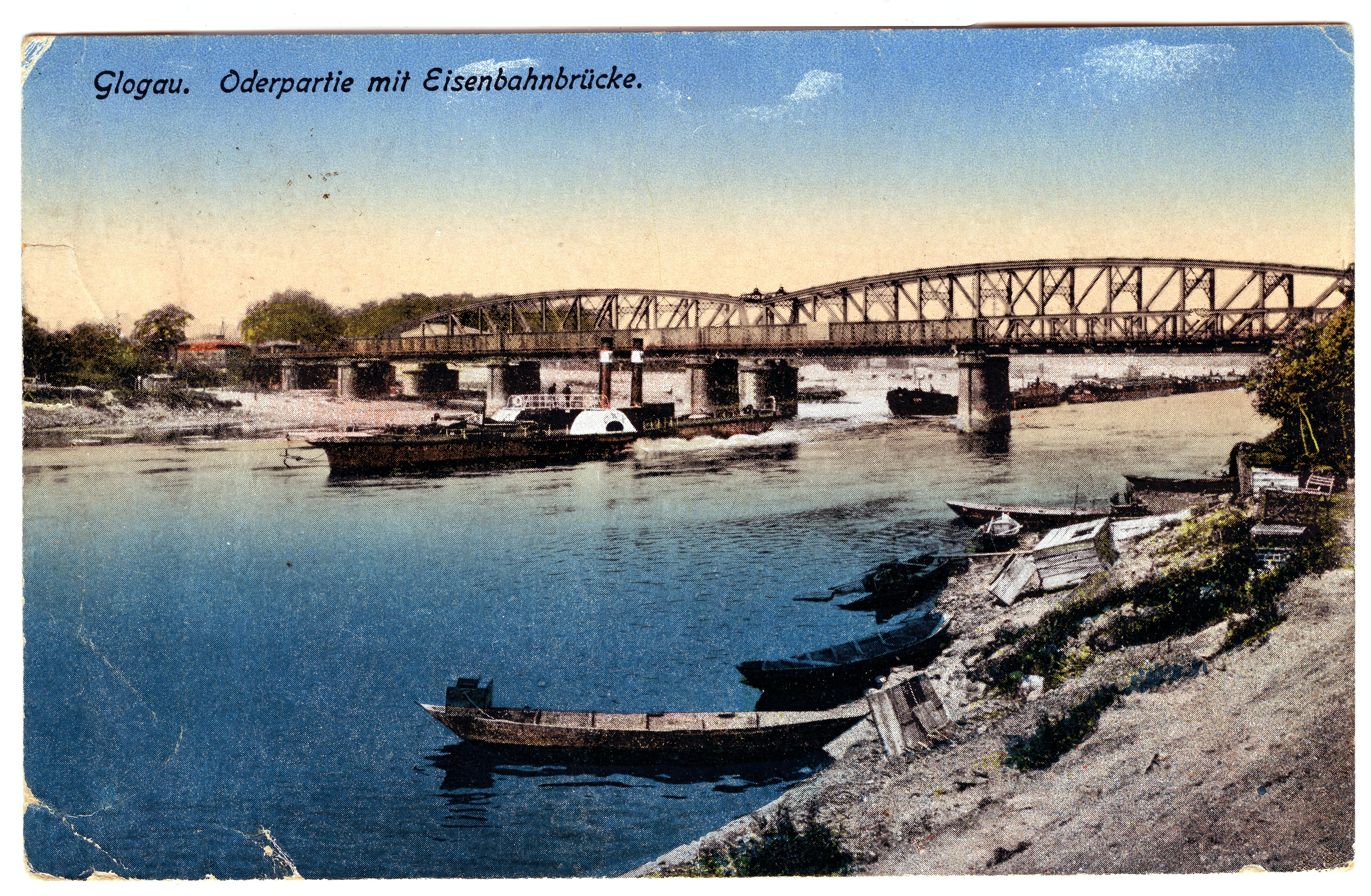 Most kolejowy w Głogowie na pocztówce z obiegu wysłanej 17 VI 1918 r. Av. "Glogau. Oderpartie mit Eisenbahnbrücke". Wydawca (?): "B.D.G". Pocztówka znajduje się w zbiorze prywatnym Roberta Pieńkowskiego z Wrocławia (Wrocławski Bibliofil)